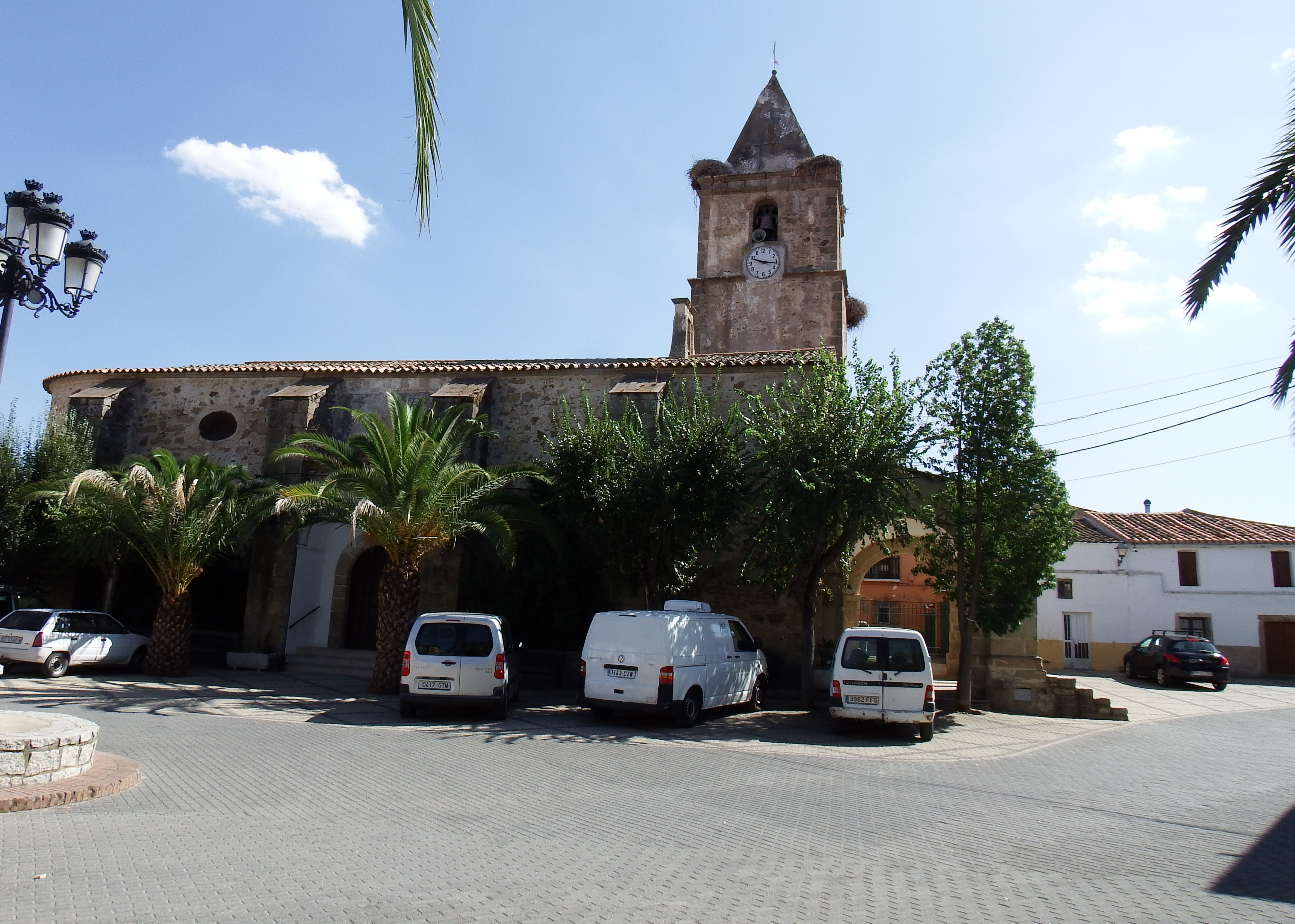 Torre de Santa María